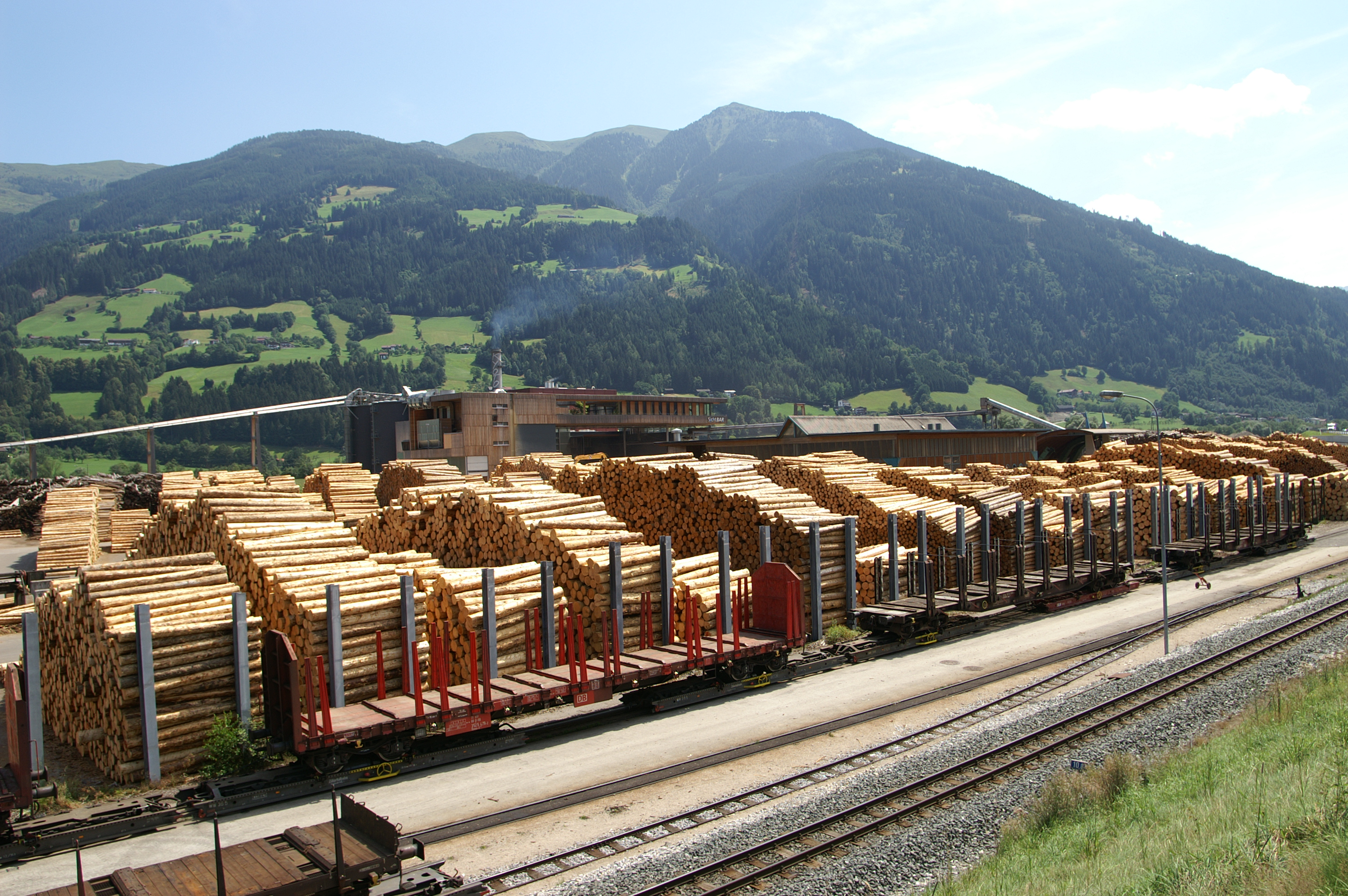 Holz Binder, Fügen im Zillertal, Tirol